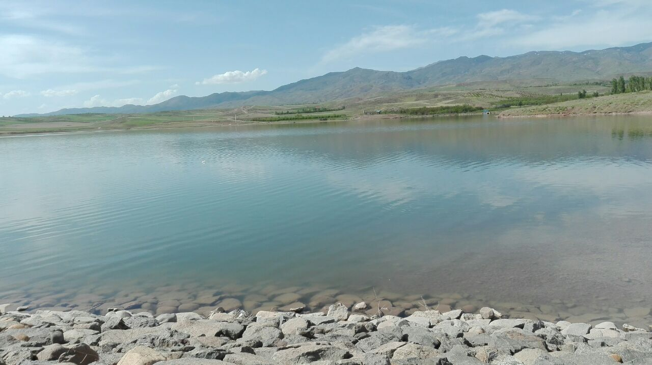 سد روستای حلمسی که بر روی رودخانه احداث شده است. از آب این سد برای مصرف شرب و همچنین کشاورزی منطقه استفاده می شود.